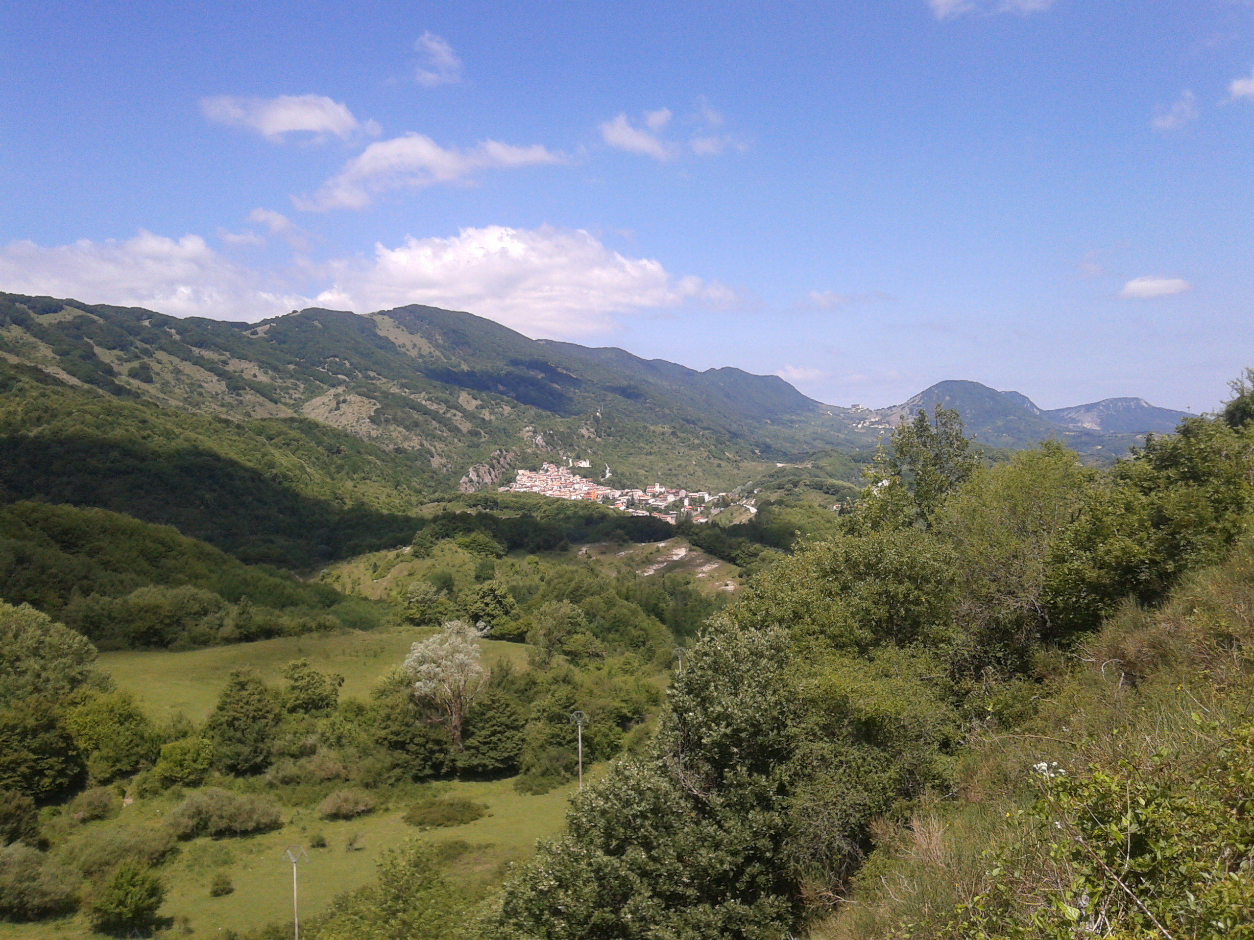 Montagne di Marsia